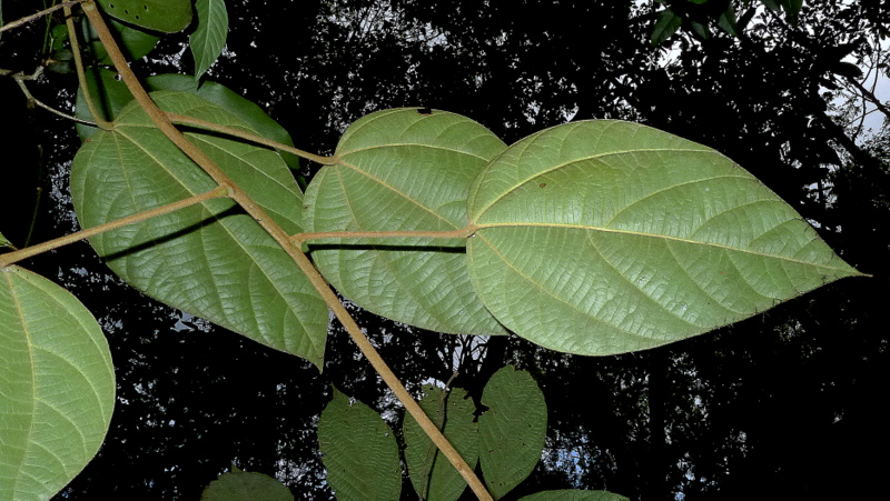 Abuta convexa (Vell.) Diels